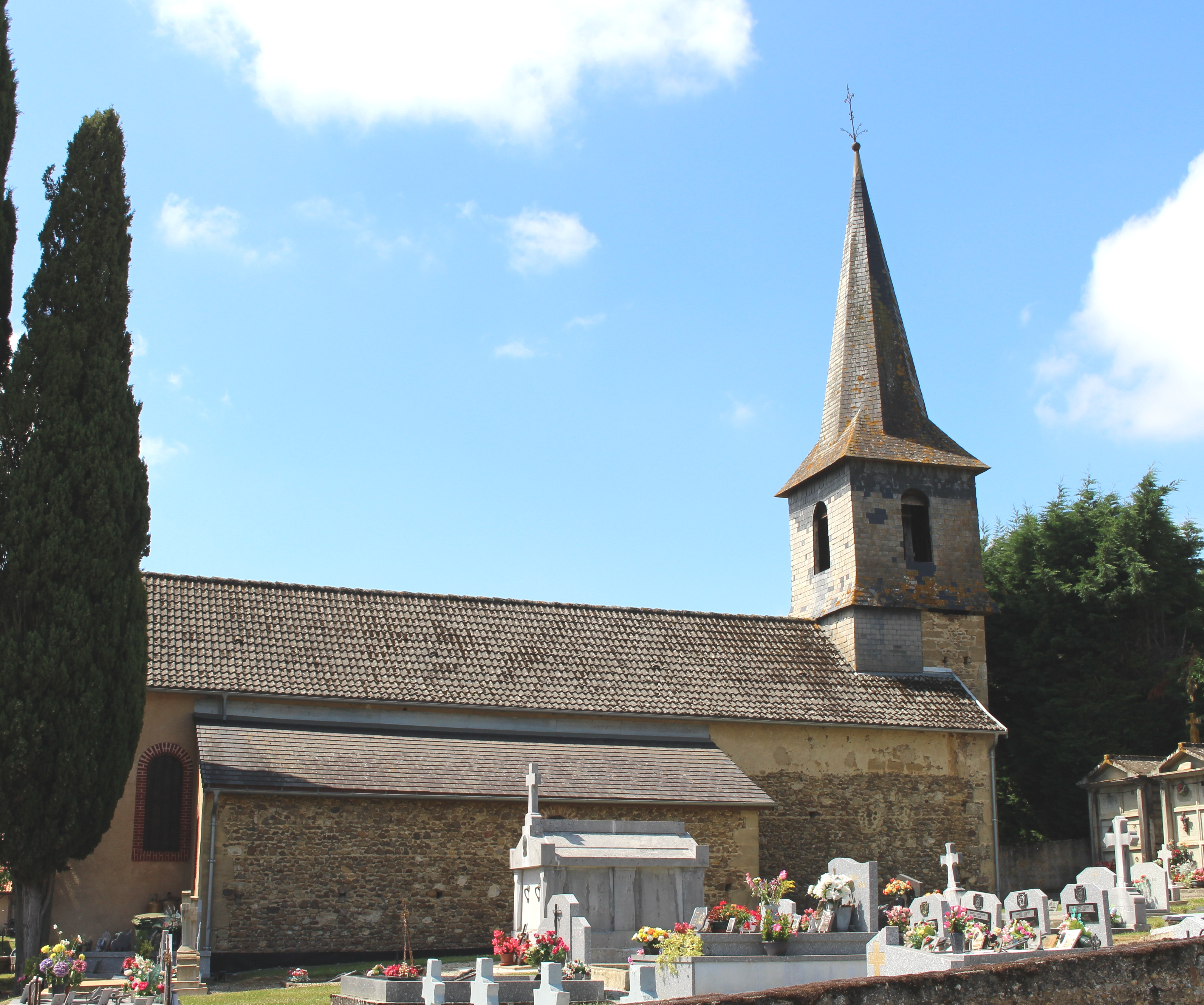 Église de la Nativité-de-la-Sainte-Vierge de La Hitte (Hautes-Pyrénées)